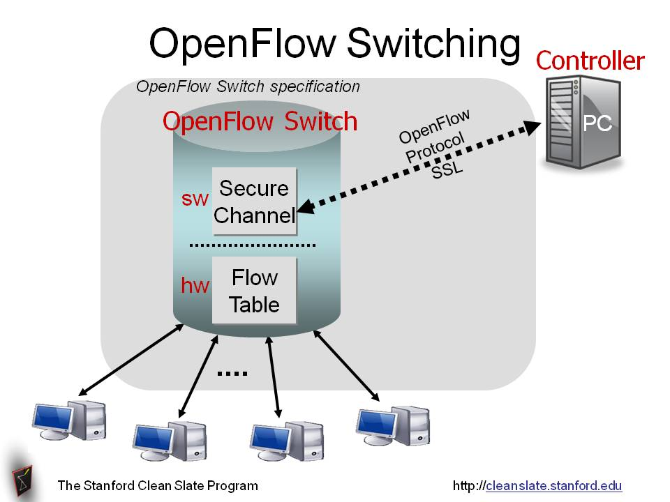 Монгол: Openflow1